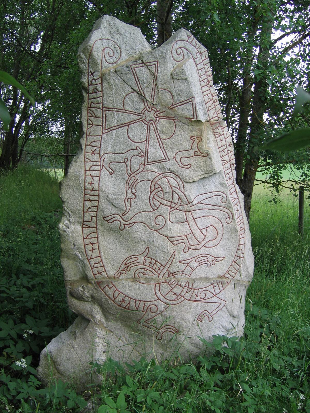 Runestone U 240, Vallentuna.